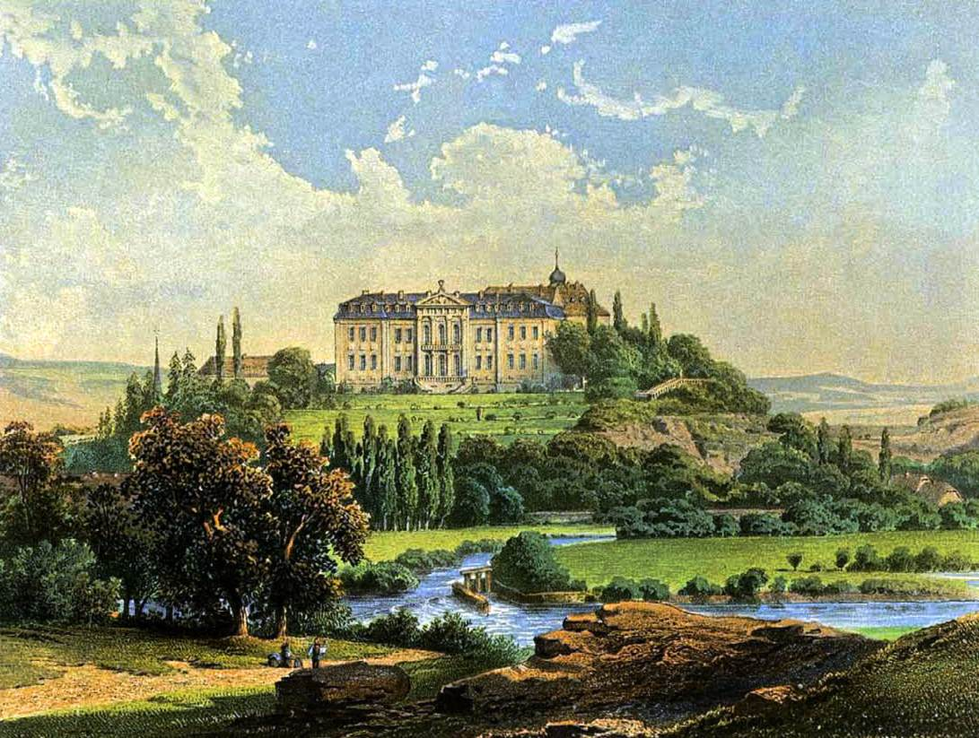 Lithographie des Schlosses Burgscheidungen